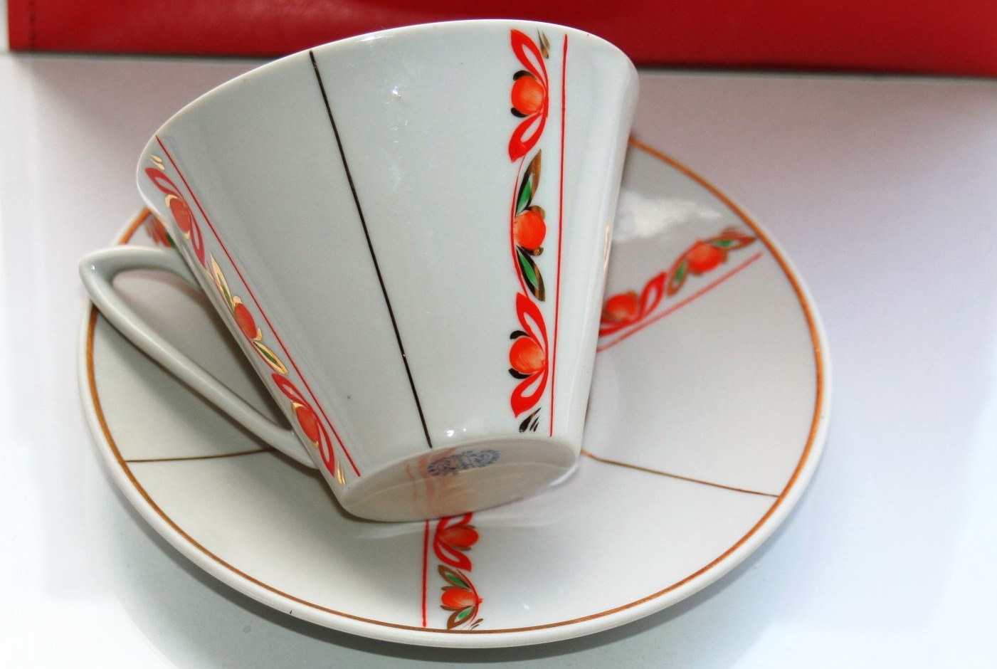 Чашка від кавового сервізу Баранівського фарфорового заводу. Ручний розпис, експортне клеймо 1960-ті роки. Детально про БФЗ